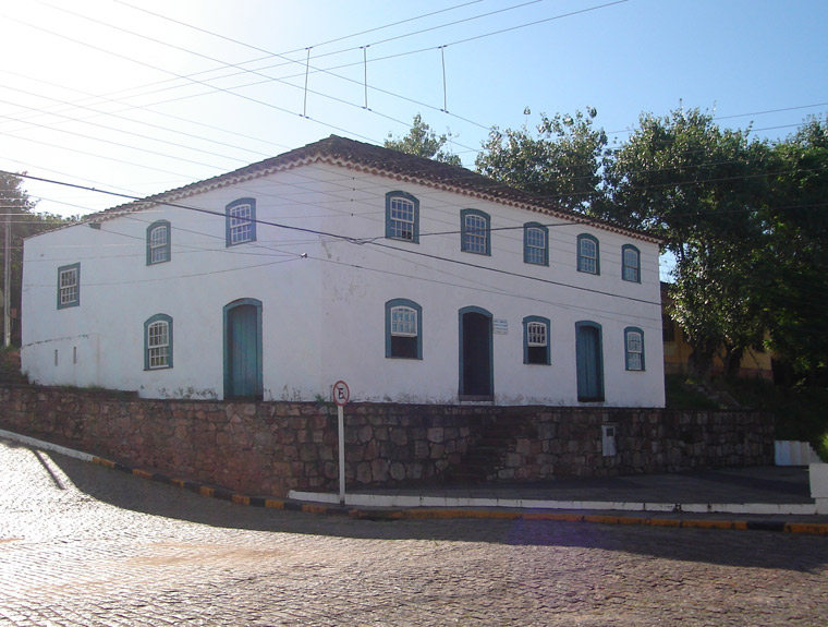 Solar Almirante Alexandrino, no município de Rio Pardo, Rio Grande do Sul